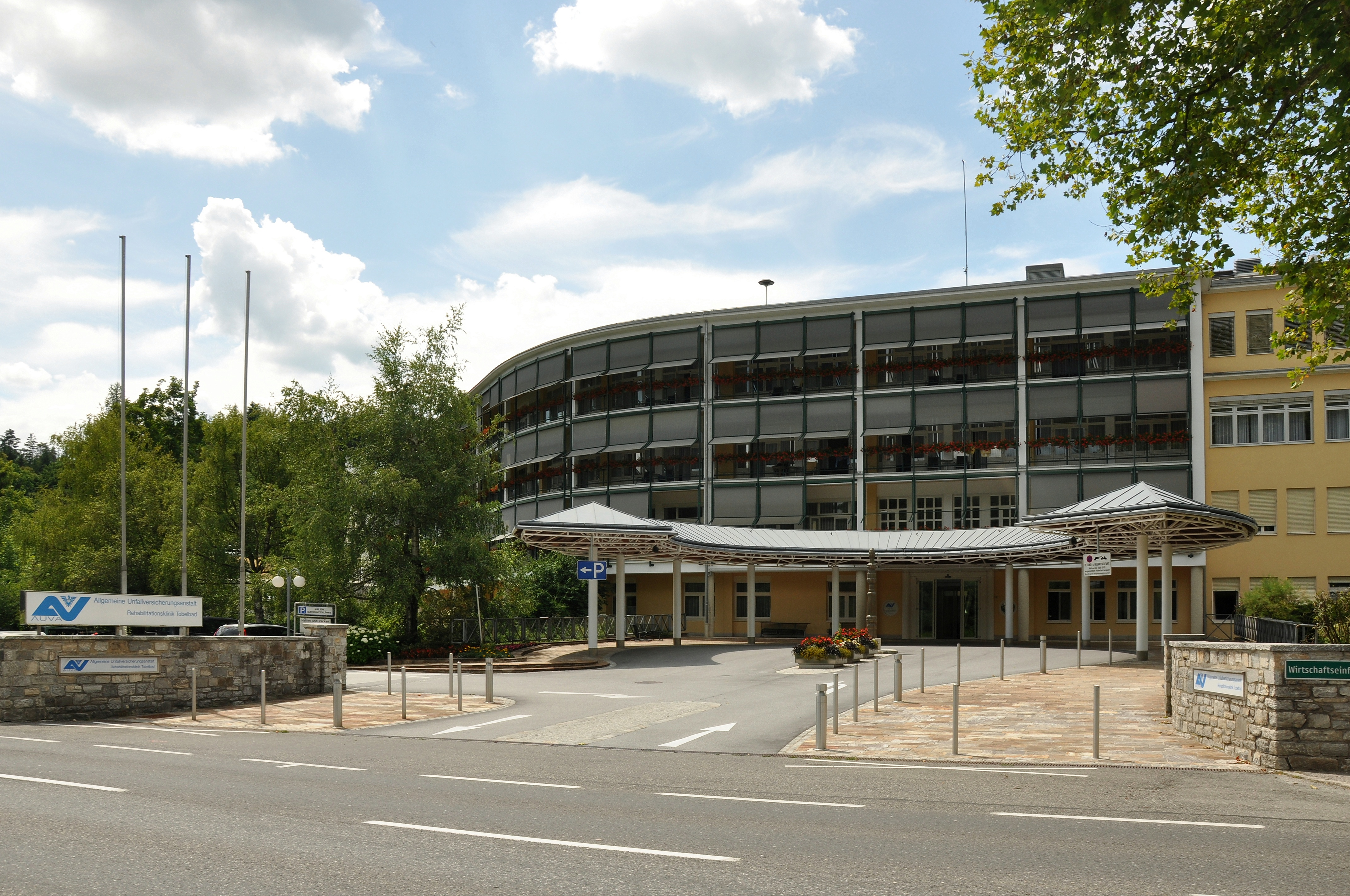 Die Rehebilitationsklinik der Allgemeinen Unfallversicherungsanstalt in Tobelbad.